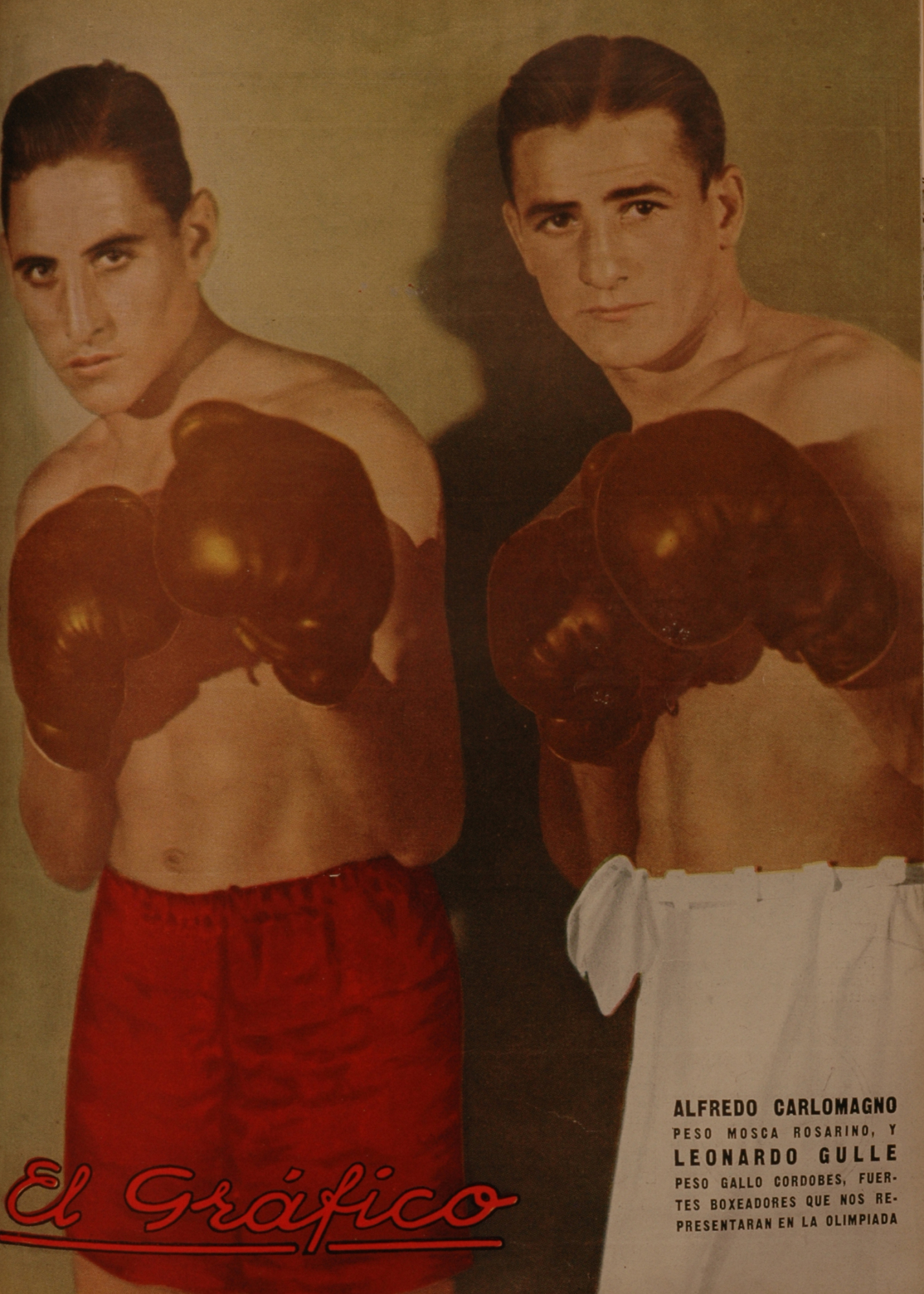 El Grafico del 27 de Junio de 1936. Edicion 885